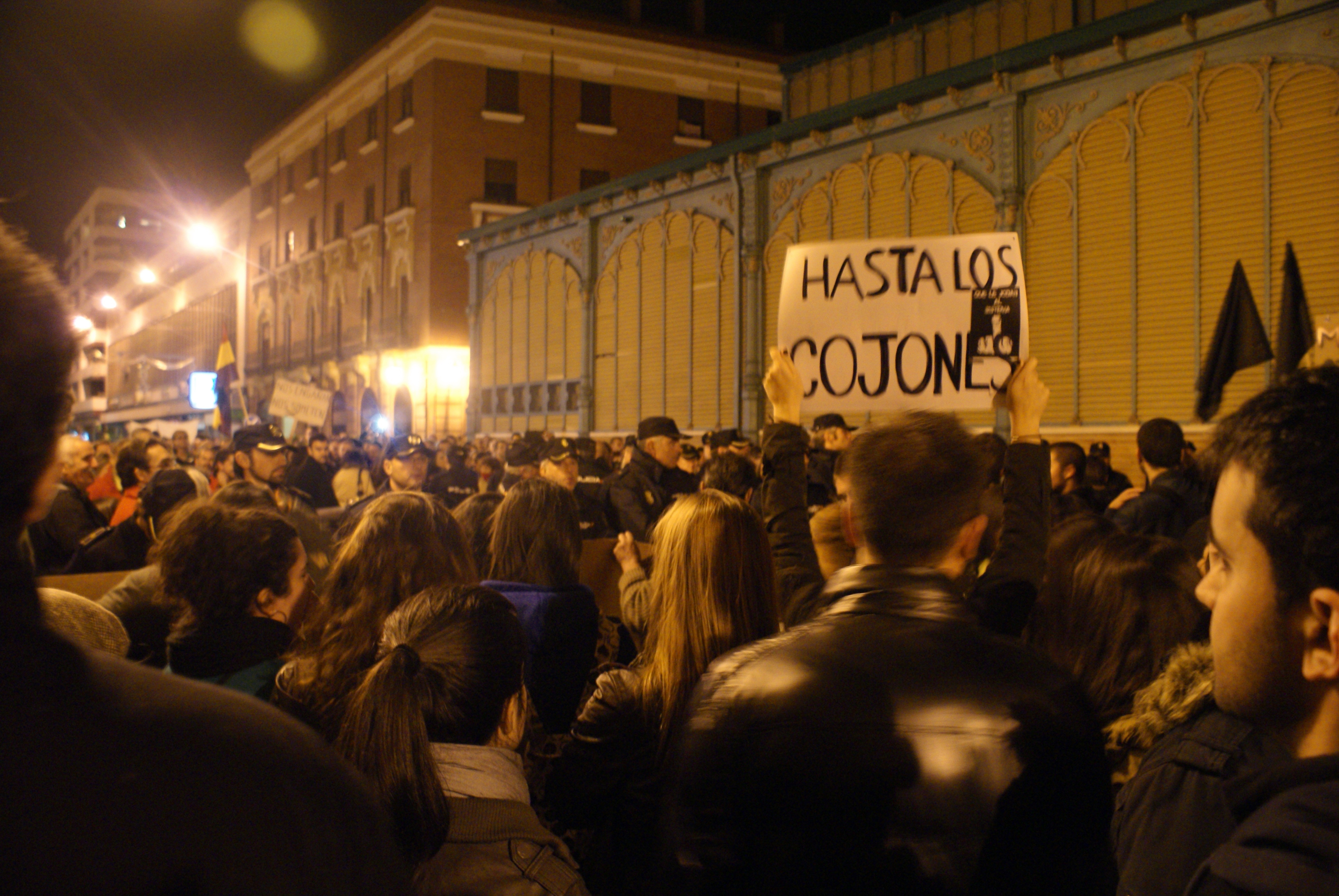 Manifestación alternativa en Palencia (España) durante la jornada de Huelga general europea de 2012.